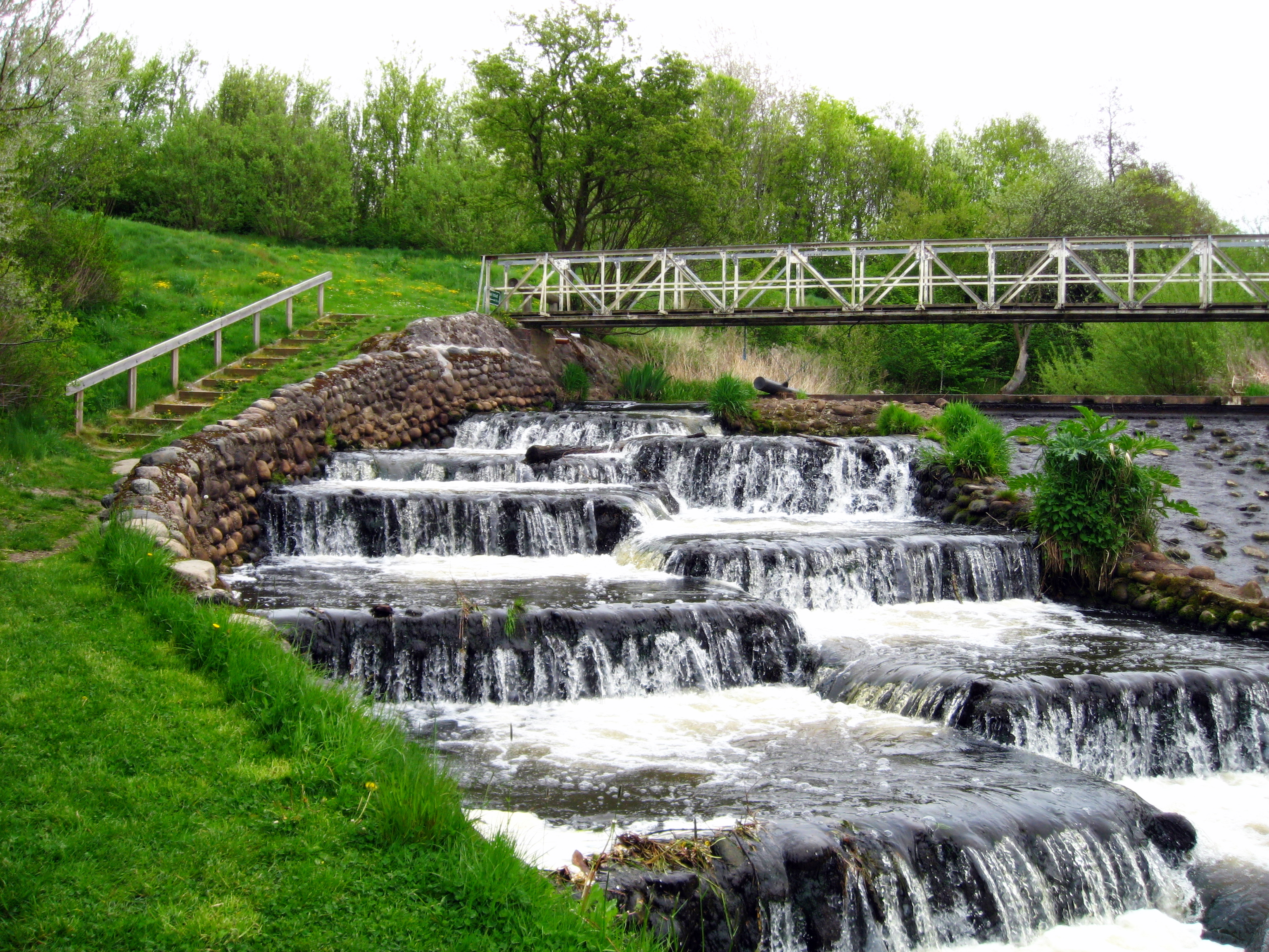 Fisketrappe ved Bindslev gamle Elværk ved Uggerby Å, Vendsyssel